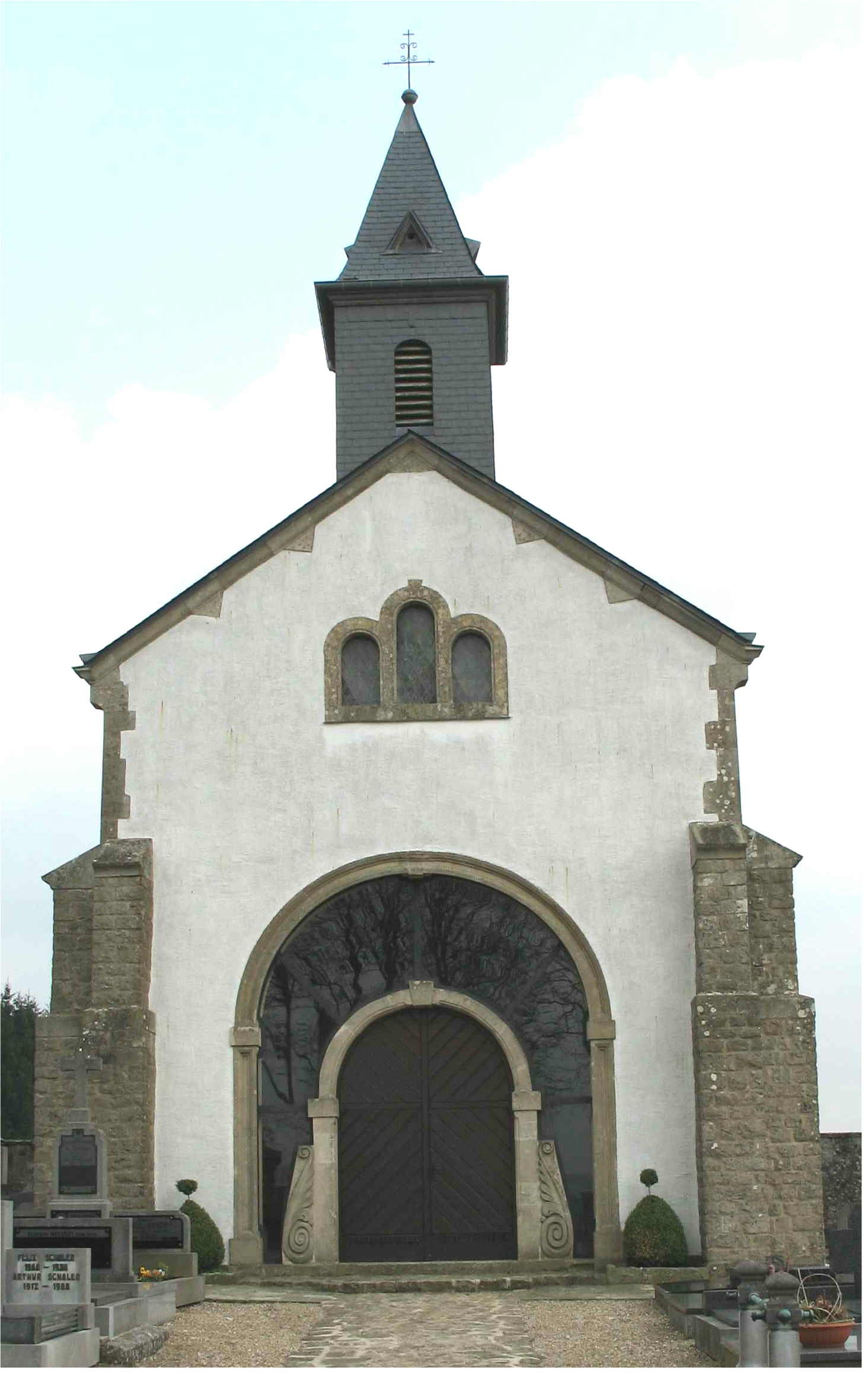 Schéimerech